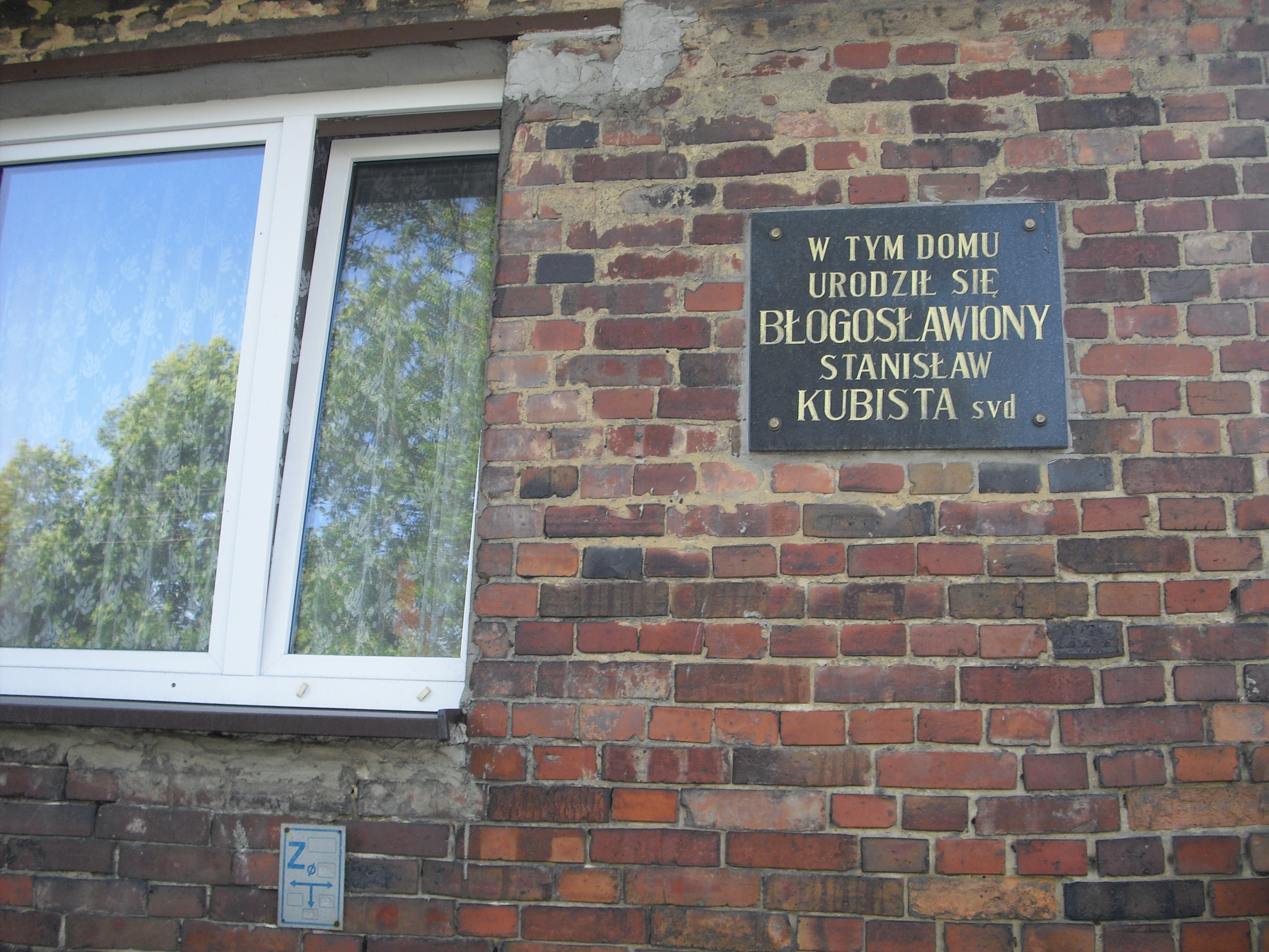 Tablica pamiątkowa na domu w którym urodził się Stanisław Kubista.Katowice Kostuchna.